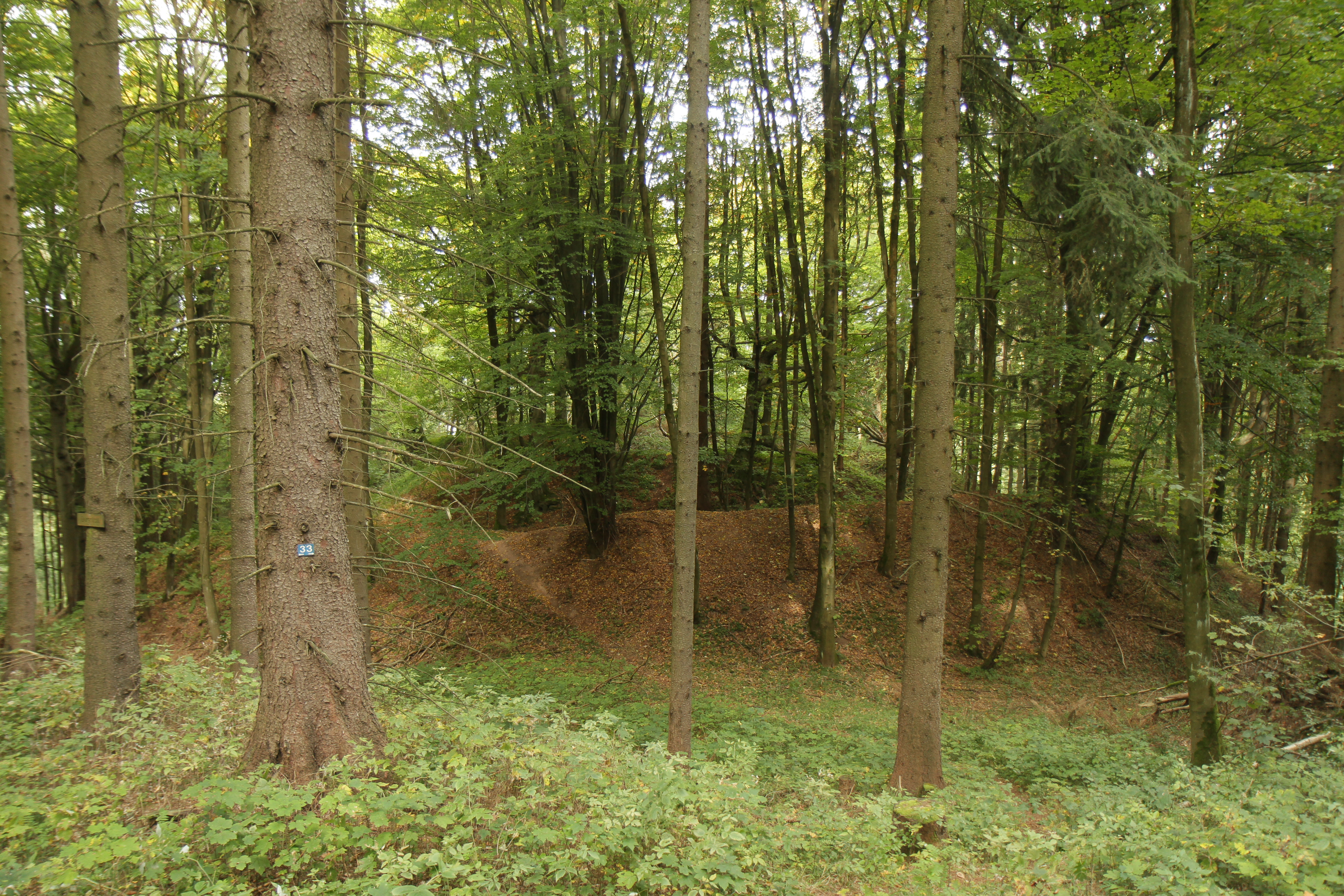 Ansicht des Burgstalles aus südwestlicher Richtung